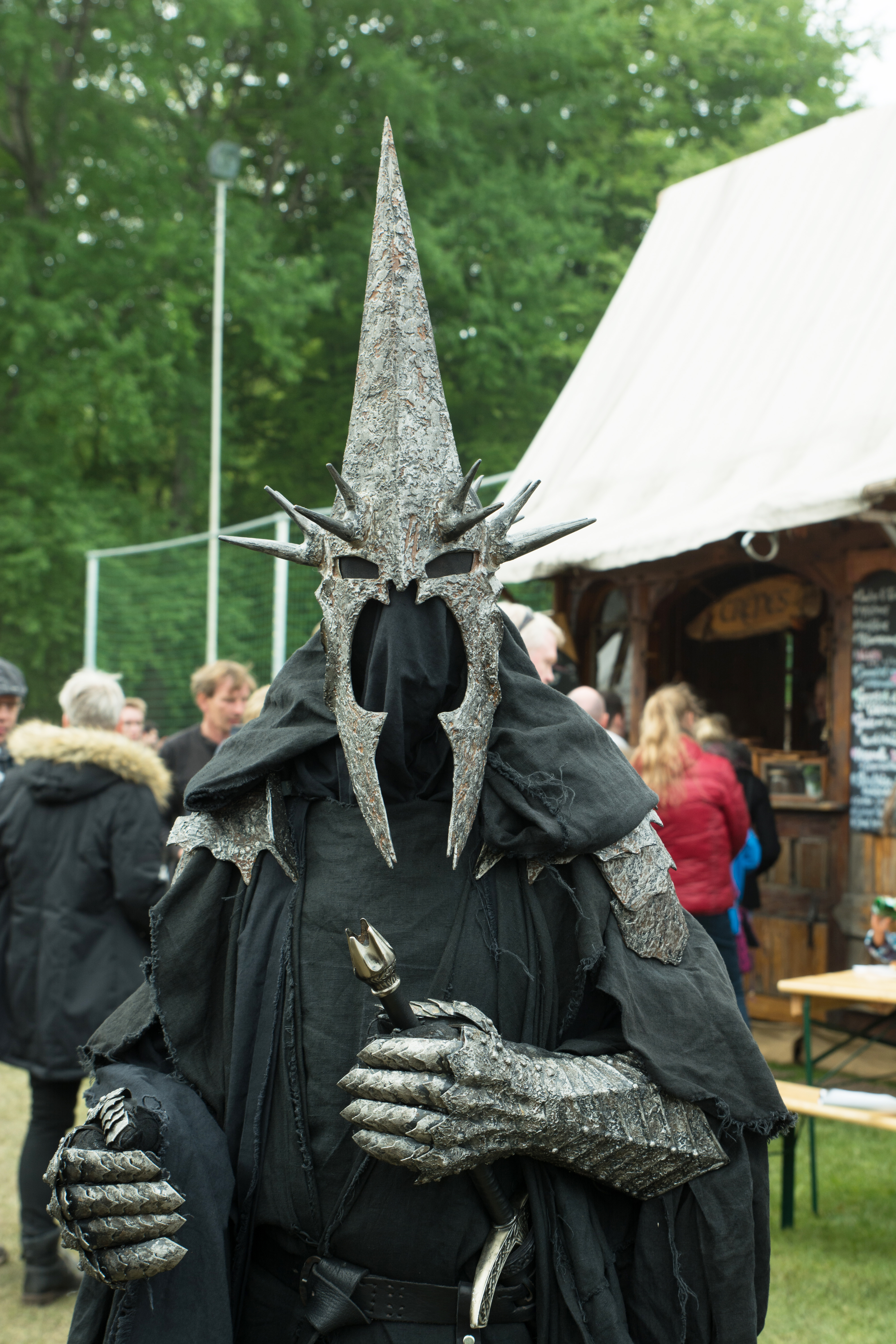 'Impressionen vom MPS Hohenweststedt 2016